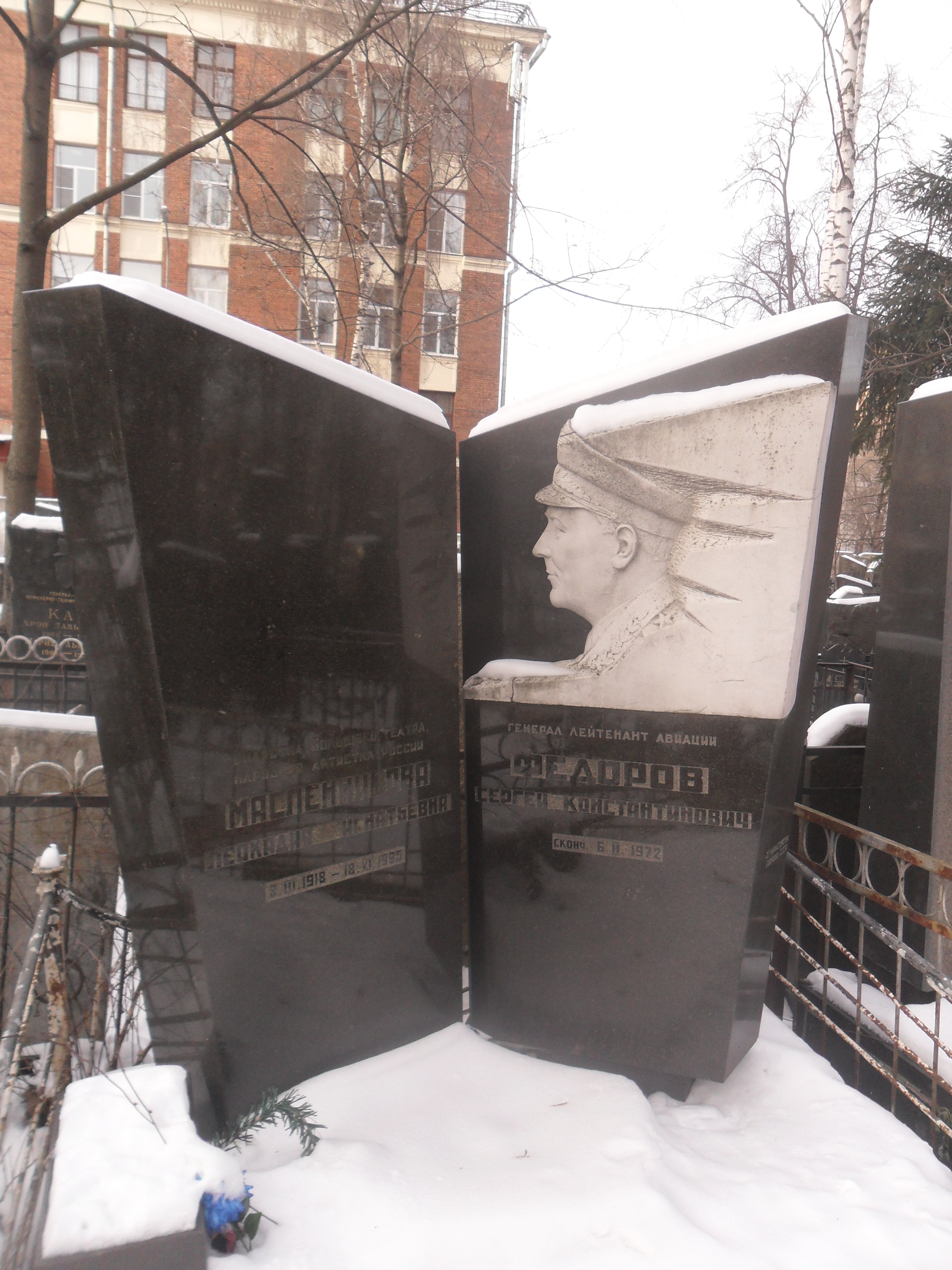 Могила народной артистки России Леокадии Масленниковой и генерал-лейтенанта Сергея Фёдорова на Введенском кладбище Москвы.